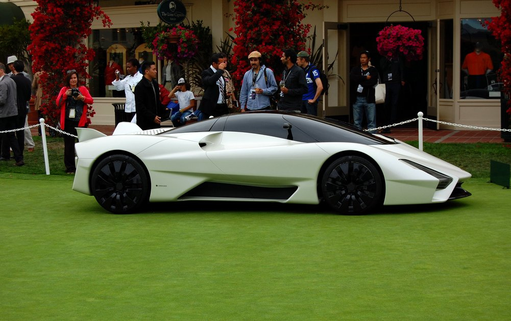 SSC Tuatara.